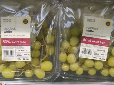 Nouveaux raisins de table du Maroc, cépage superior Seedles, juin 2008